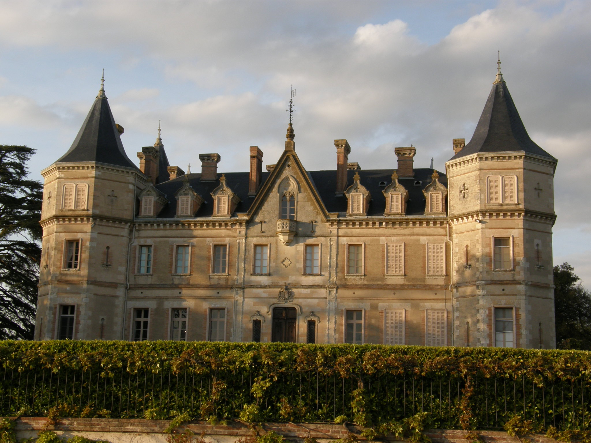 Château de Montbrun, Gers This building is en partie classé, en partie inscrit au titre des Monuments Historiques. .